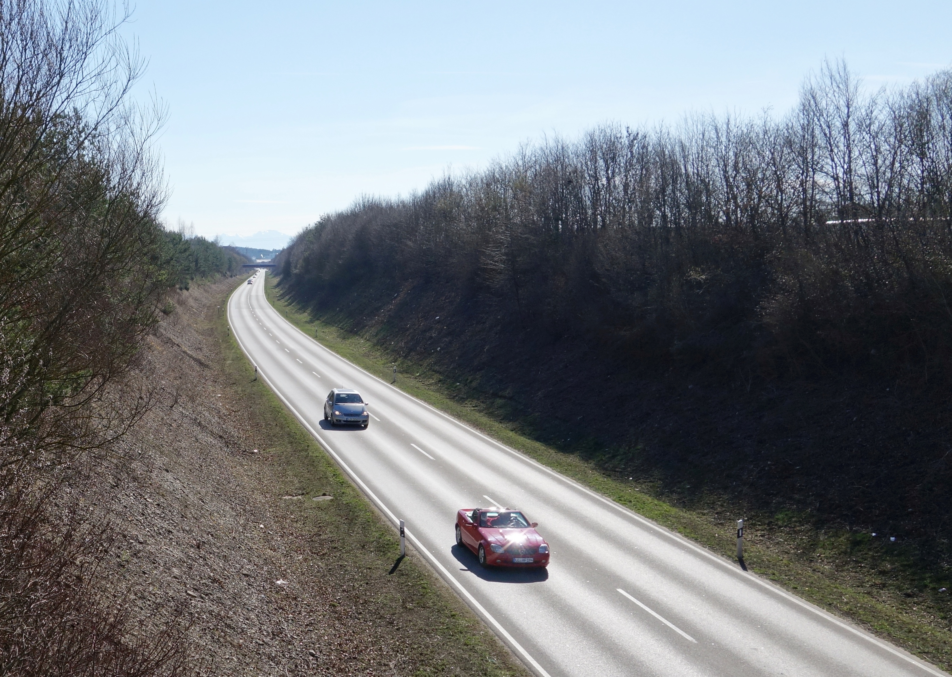 Bundesstraße 17 auf Schongauer Gemeindegebiet, von der Köllenweg-Brücke Richtung Süden